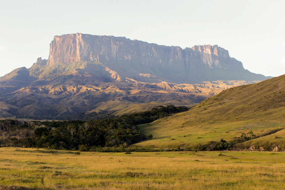 Monte Kukenan ao fundo, na trilha para o Monte Roraima